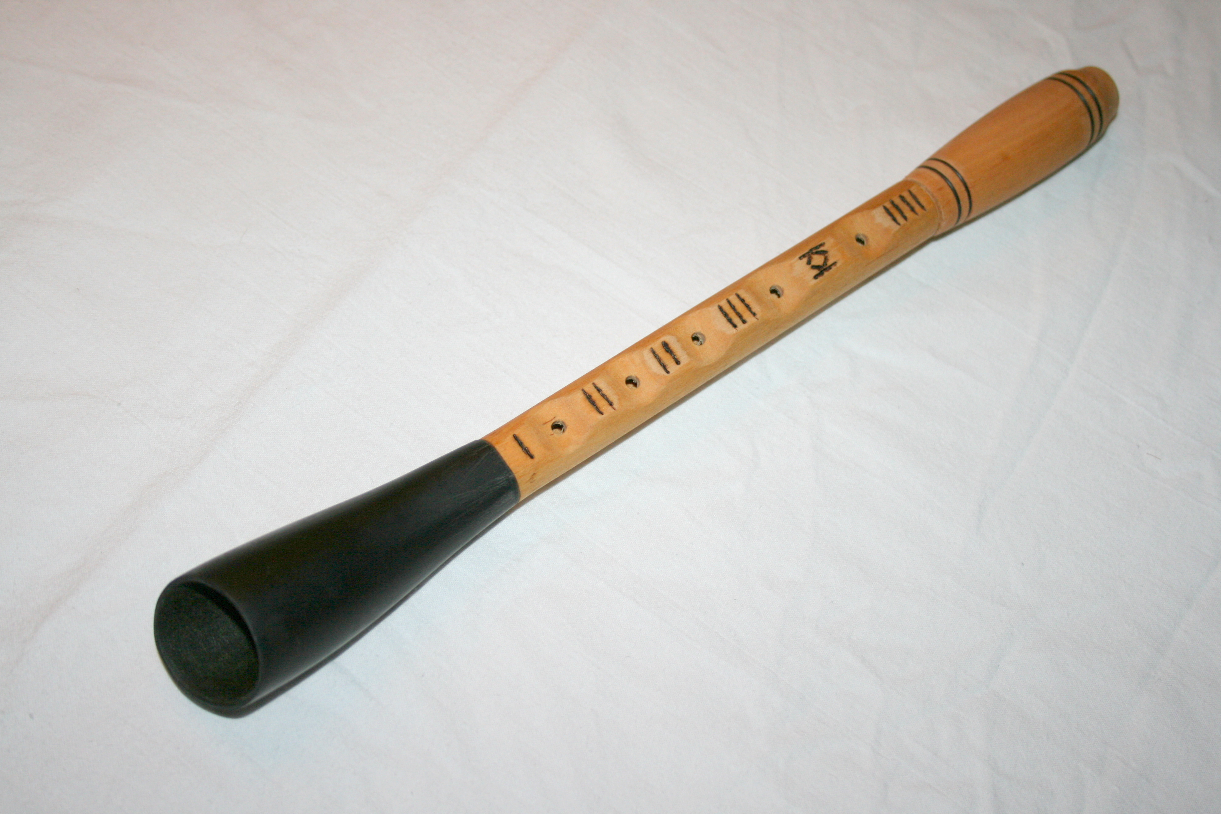 Falsterpiben forsøgt rekonstrueret af instrumentmager Kaj Kok.